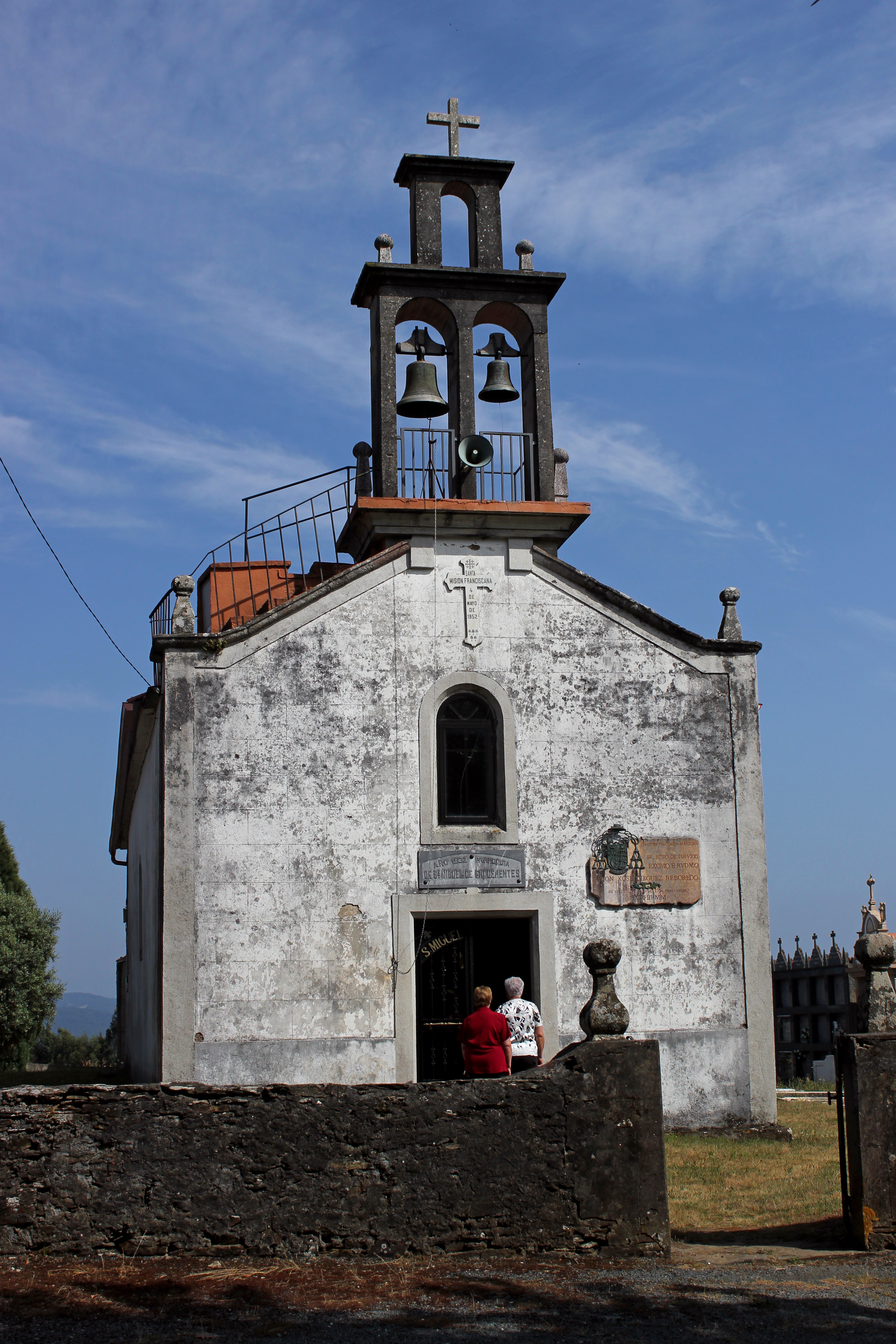 Igrexa de Enquerentes no concello de Touro.